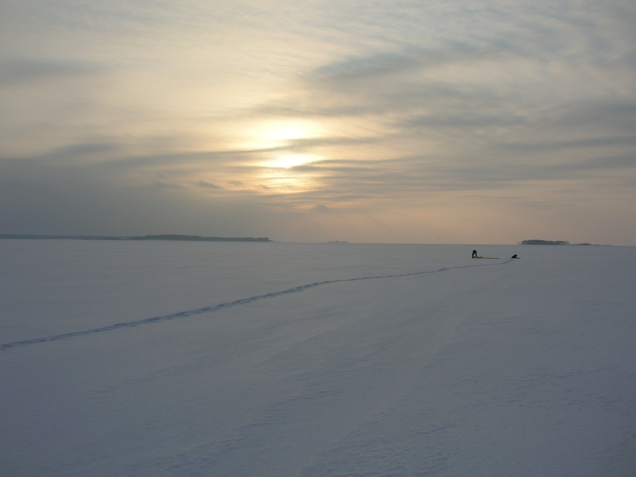 Obskoe more in winter